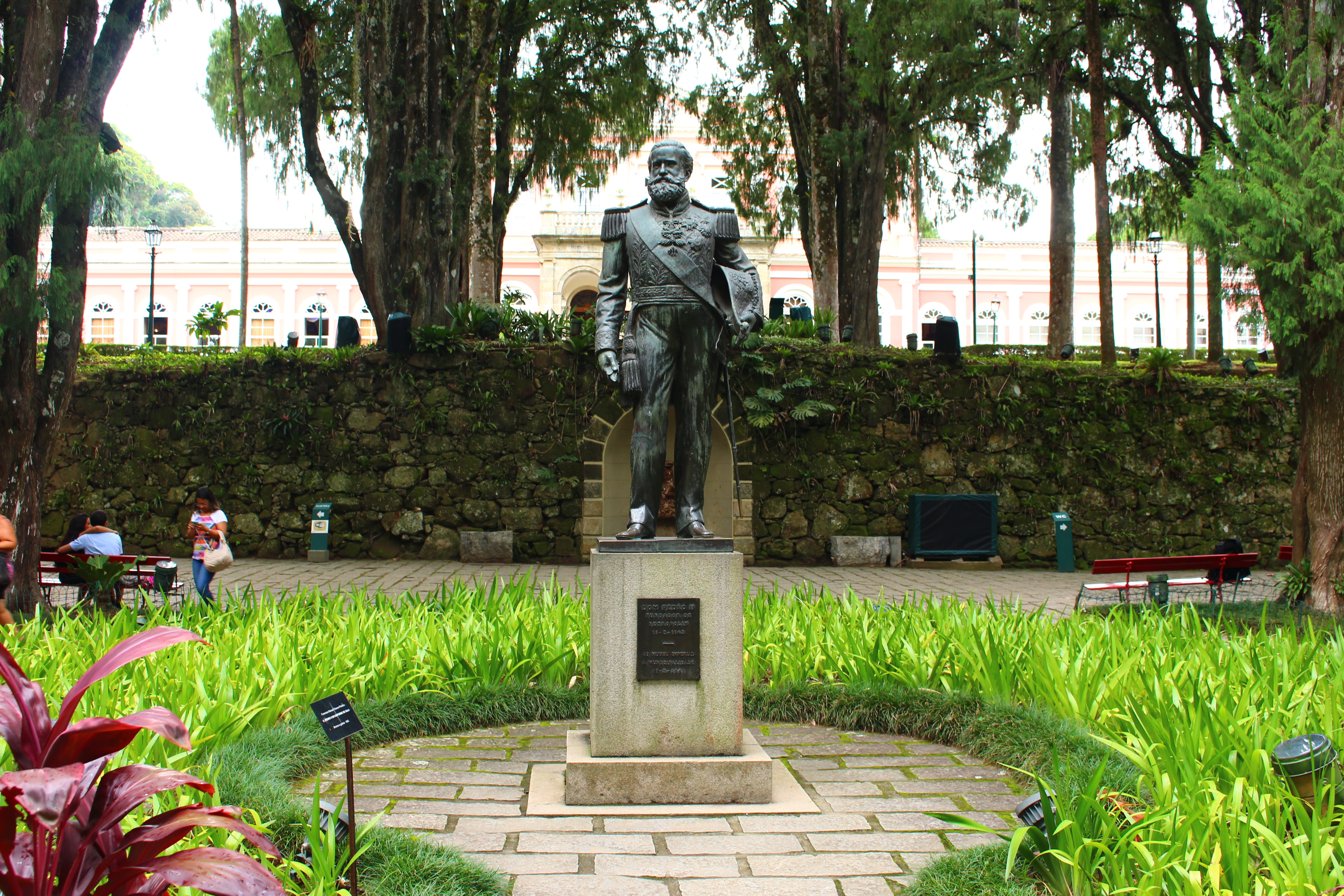 Palácio Imperial de Petrópolis, parque e Quartel dos Semanários